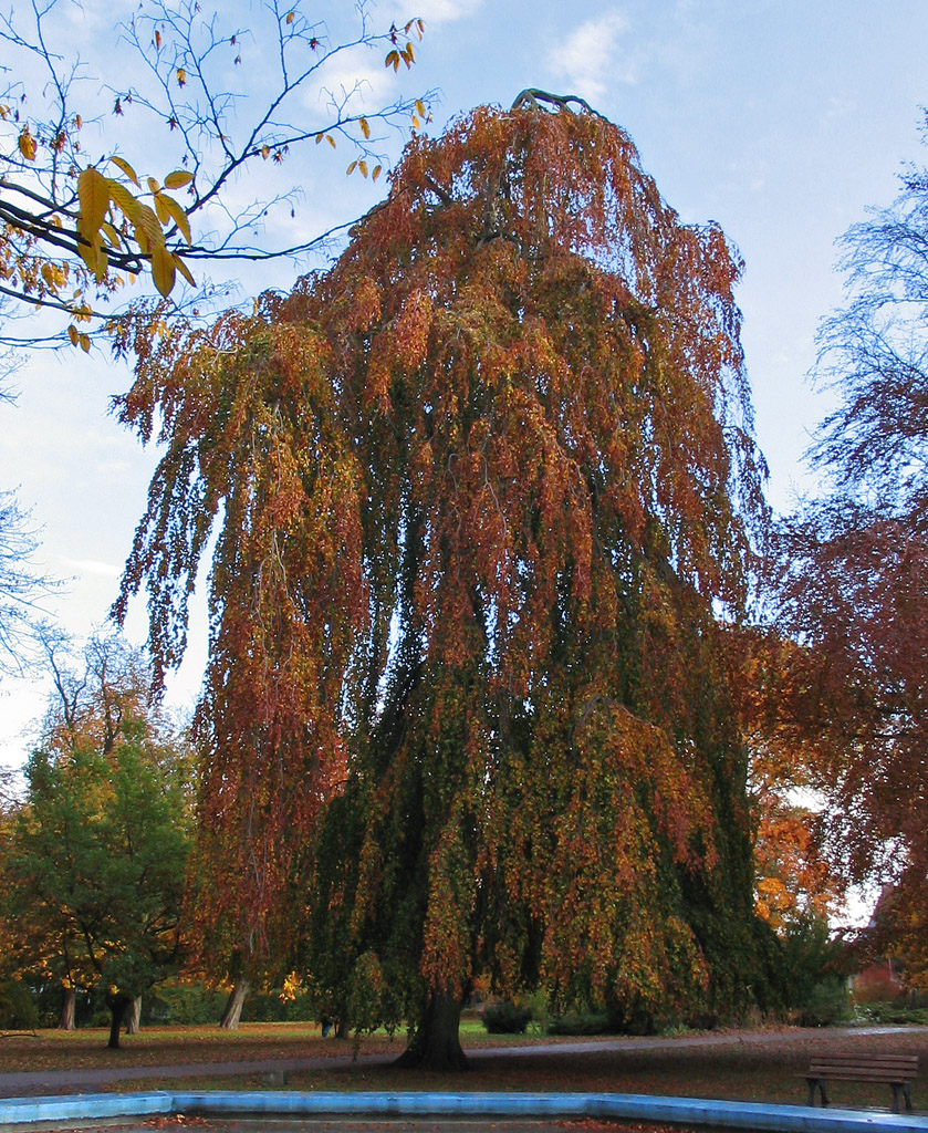 Hängebuche (Fagus sylvatica f. pendula)